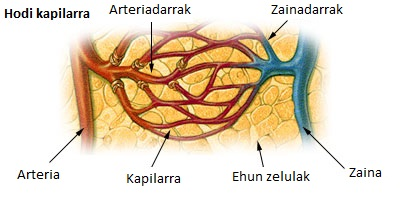 Kapilarrak, arteriak eta arteriadarrak, zainak eta zainadarrak eta ehun zelulak non dauden erakusten duen irudia.